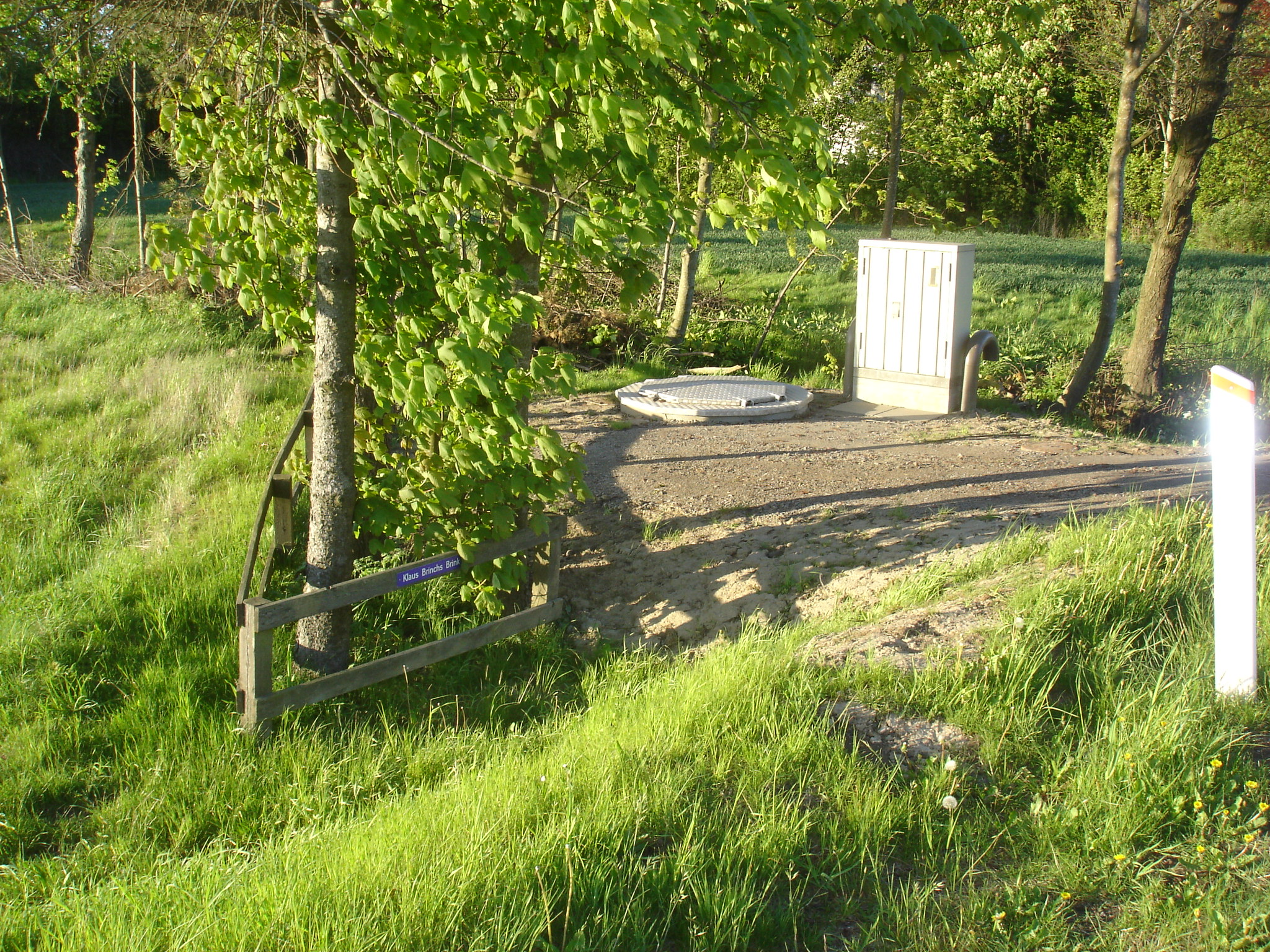 Klaus Brinchs Brink udenfor Østermarie ved et vandløb, hvor meridianen 15 grader øst skærer Almindingensvej